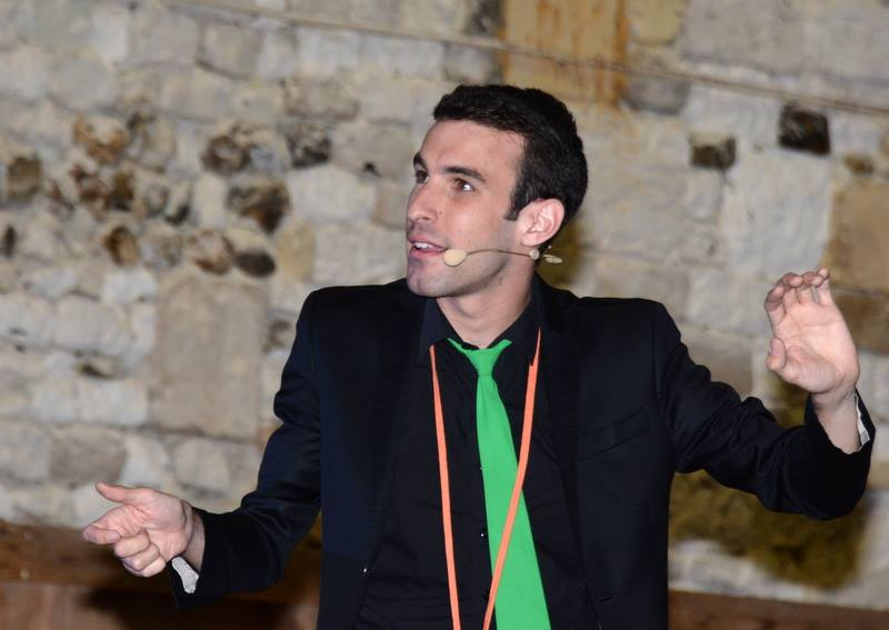 Max Bird au festival de Cabourg